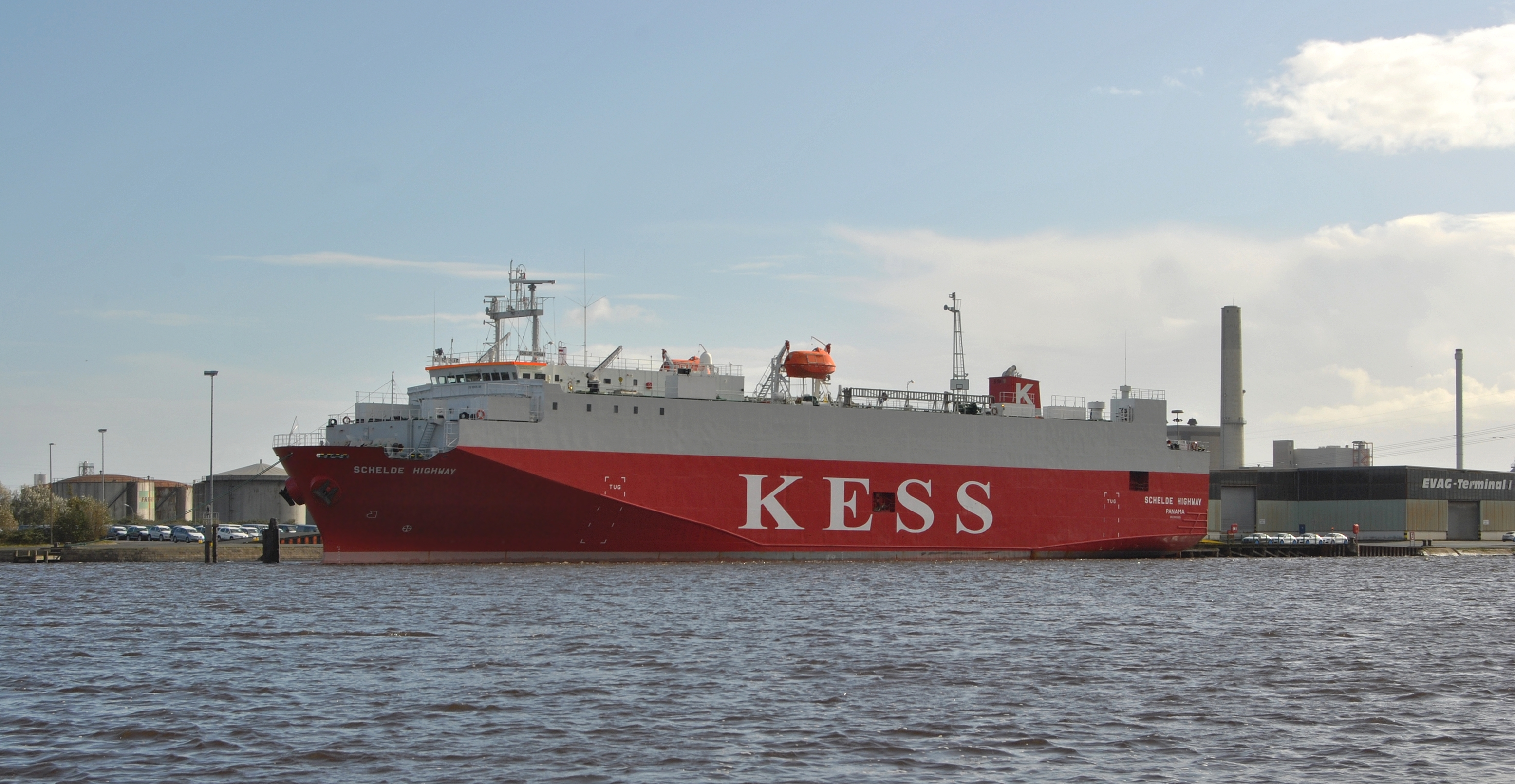 Das panamaische Massengut- und Trockenfrachtschiff Schelde Highway im Emder Hafen